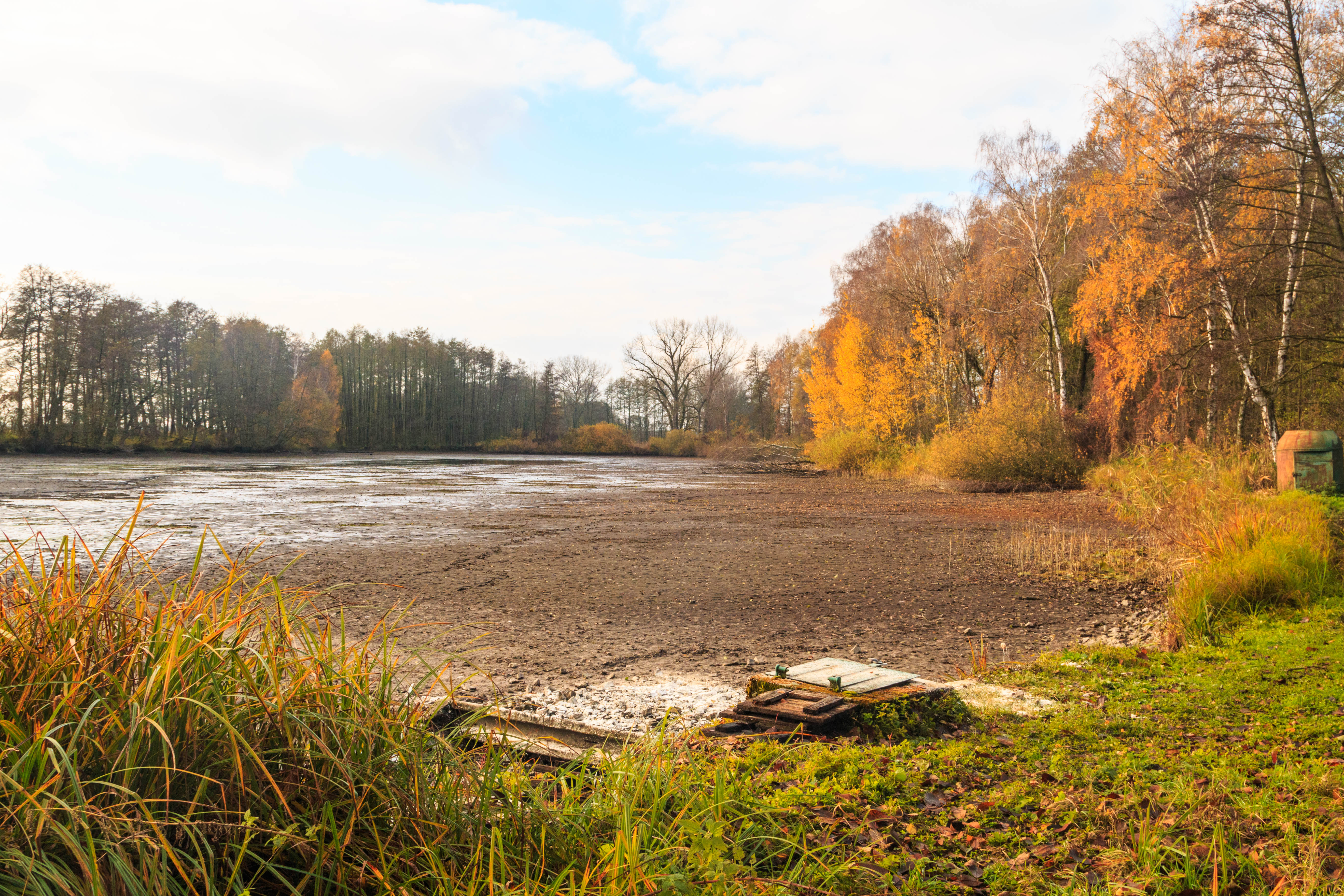 Horní Zábranský rybník